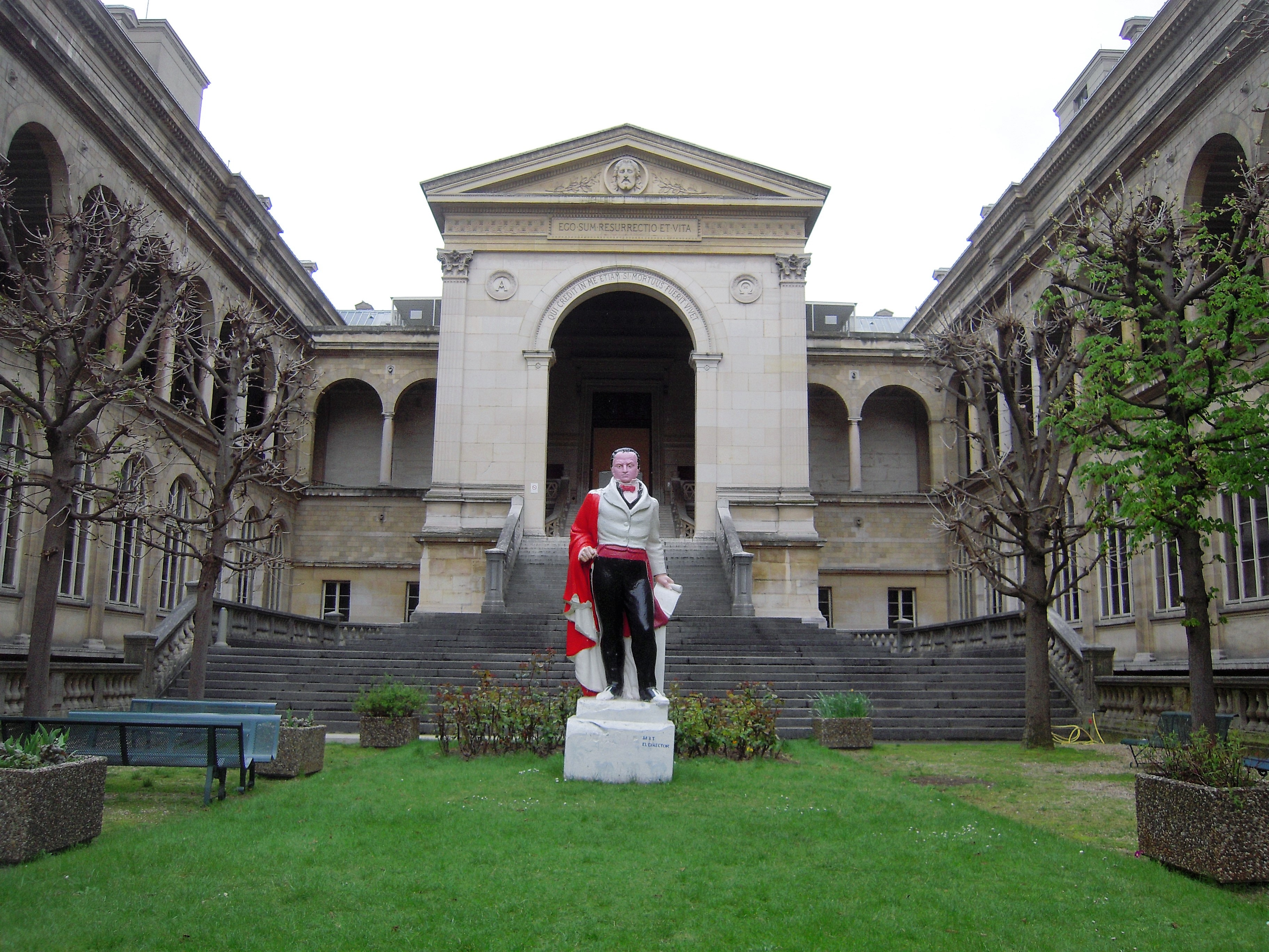 La statue du baron Dupuytren (1777-1835) orne la cour de l’Hôtel-Dieu, à Paris. Il fut ancien chirurgien en chef de l’hôpital.